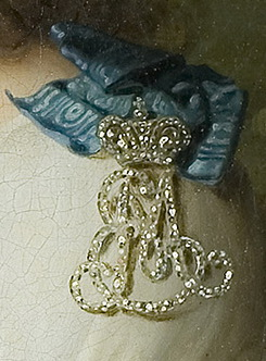 Боровиковский Владимир Лукич Портрет гр. М.А.Орловой-Денисовой 1801 холст, масло 75 x 60